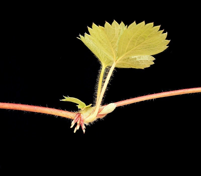 Fragaria × ananassa (Fragaria virginiana × Fragaria chiloensis) × Comarum palustre 'Pink Panda'